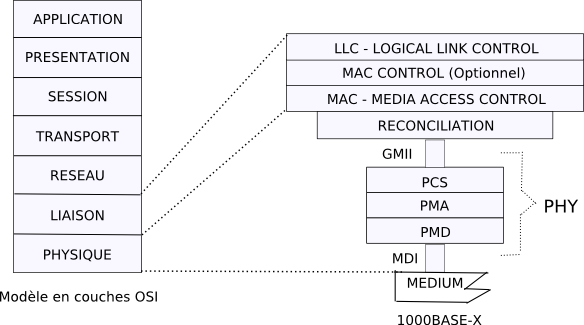 Couche PHY du standard 1000BASE-X